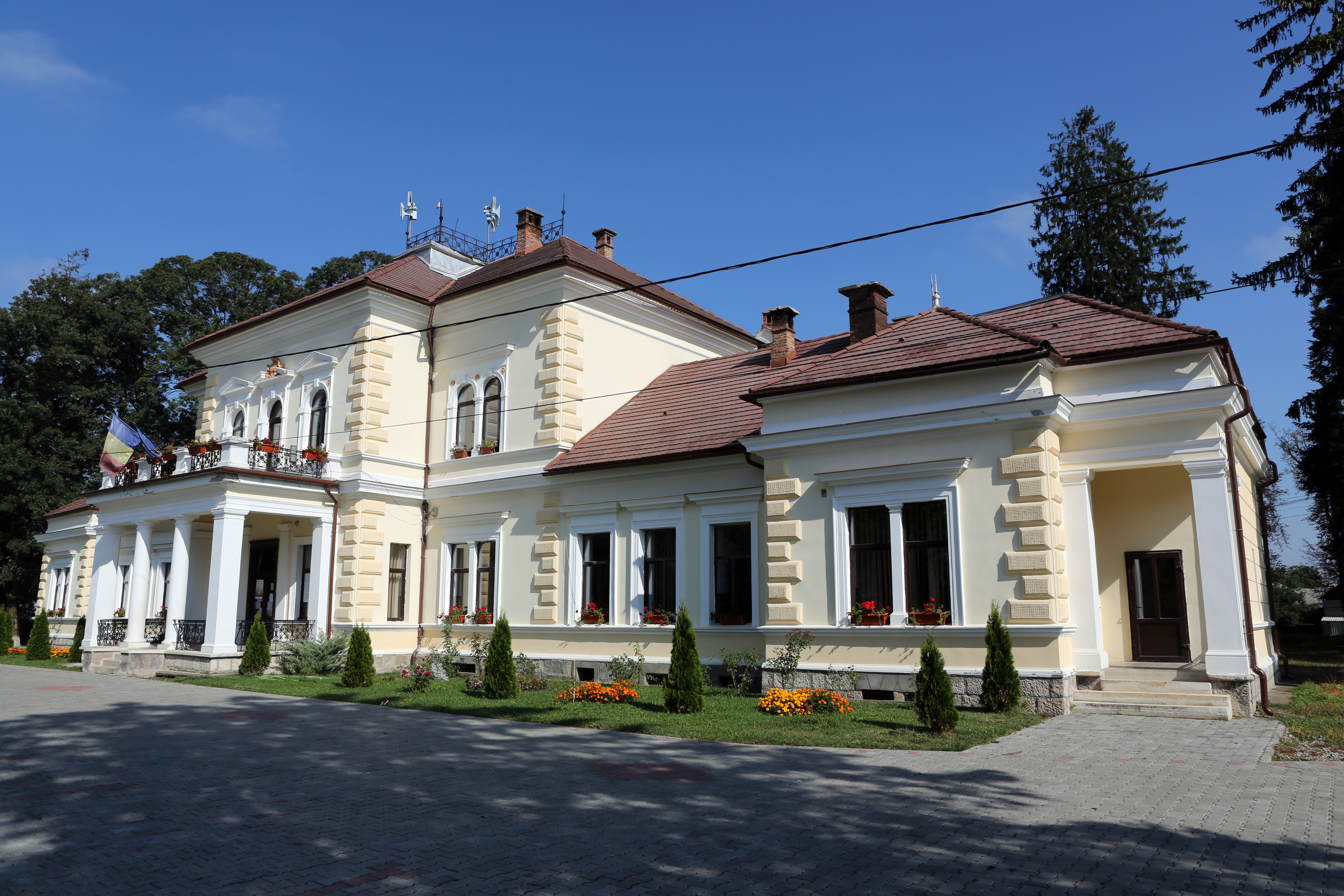 Castelul Beldy Ladislau, azi primărie 01